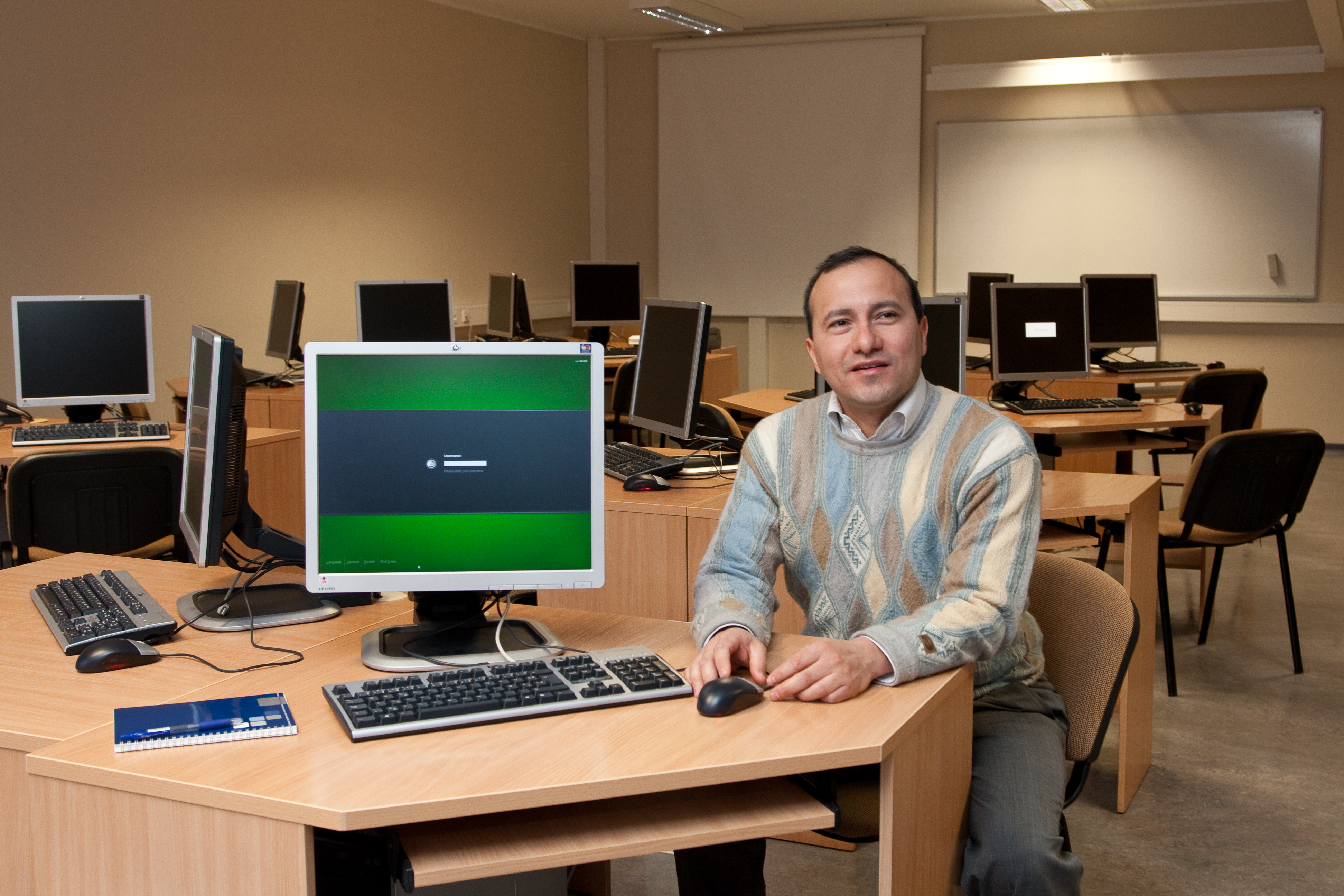 TÜ arvutiteaduste instituudi tarkvaratehnika professor Marlon Dumas.